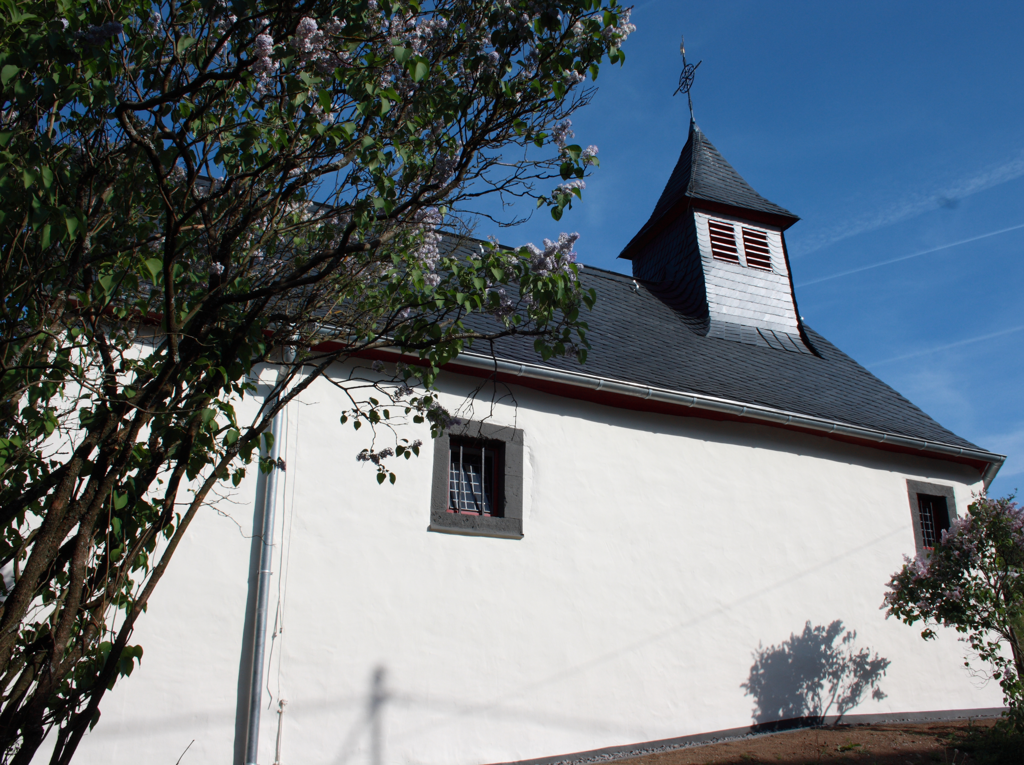 Filialkirche St. Georg im Wohnplatz Krebsbacher Hof von Meuspath